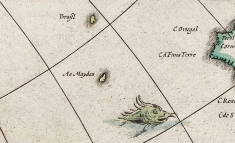 Ausschnitt von Willem Blaeus Karte mit der Phantominsel Mayda von 1649